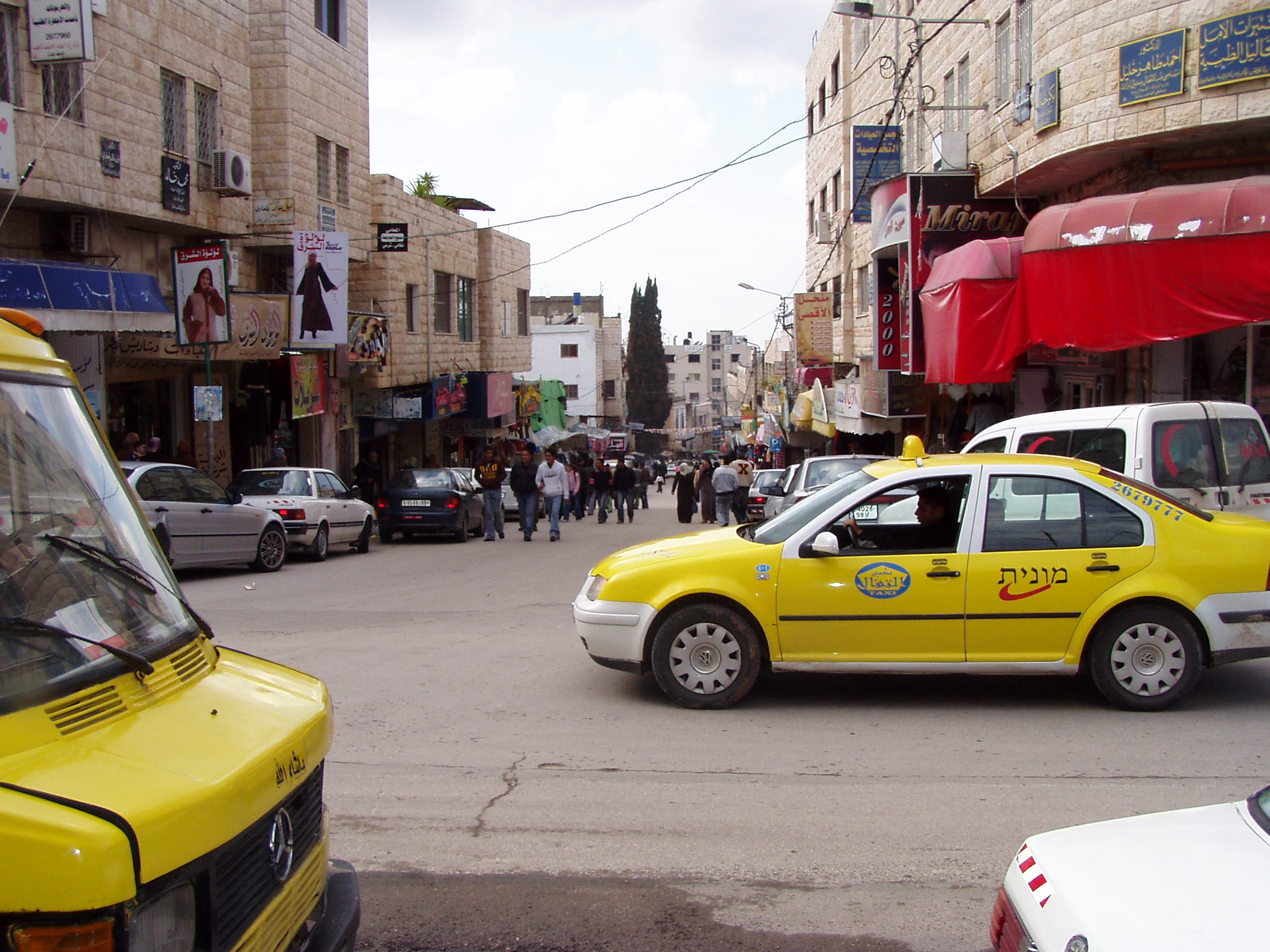 Tulkarm, Paris street